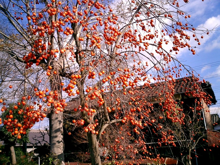 kaki,persimmon